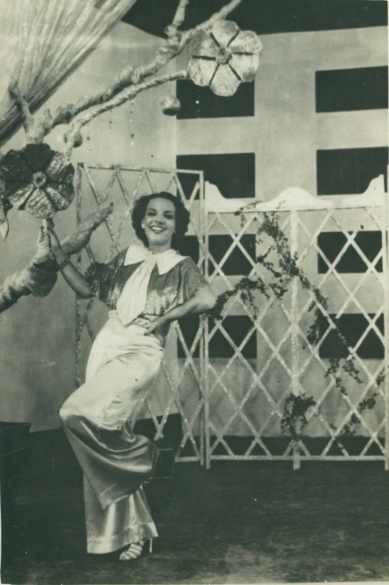 Carmen Miranda em cena do filme Alô, Alô Carnaval (1936)